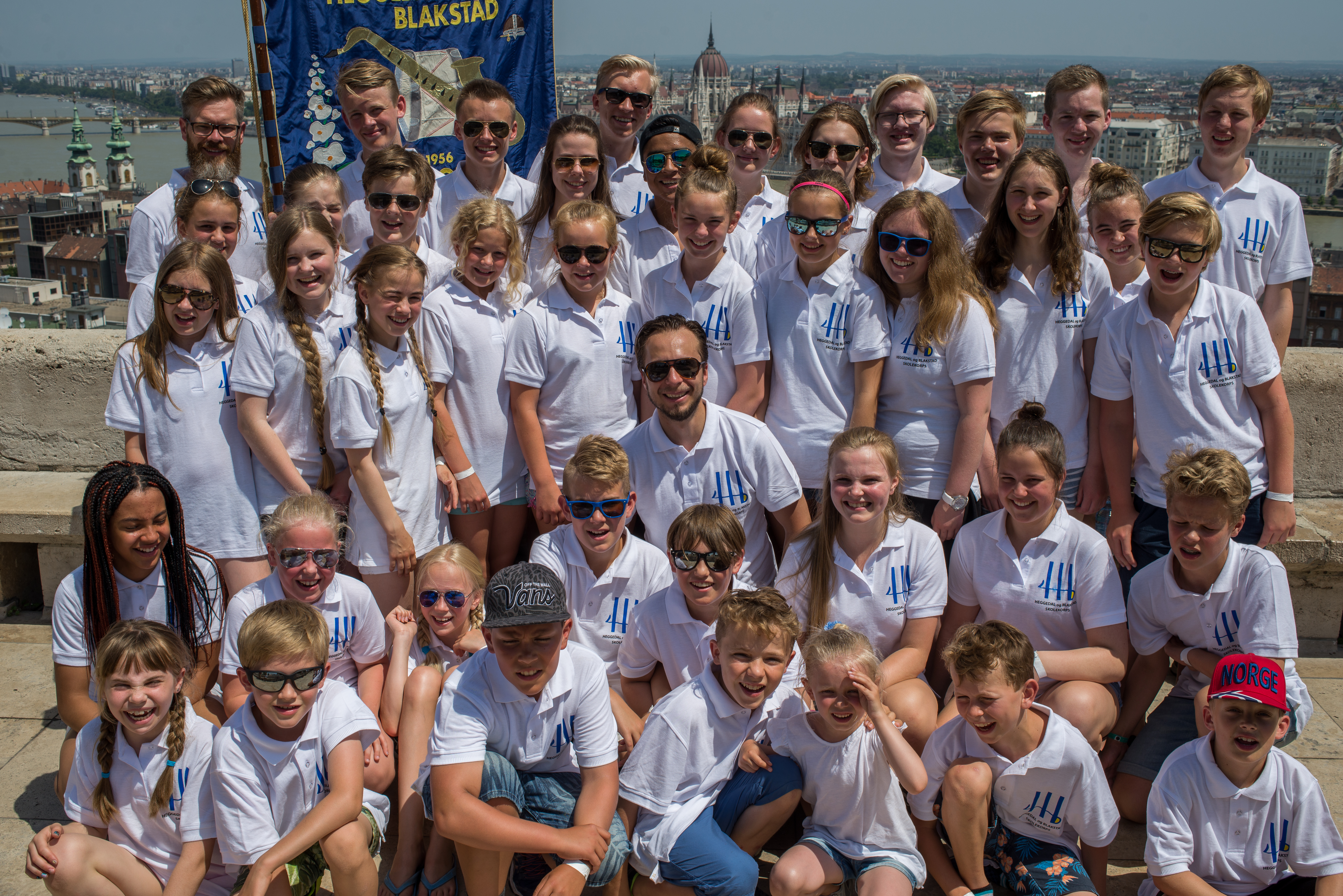 Gruppebilde av hovedkorpset til Heggedal og Blakstad skolekorps fra sommertur 2016 til Budapest, Ungarn